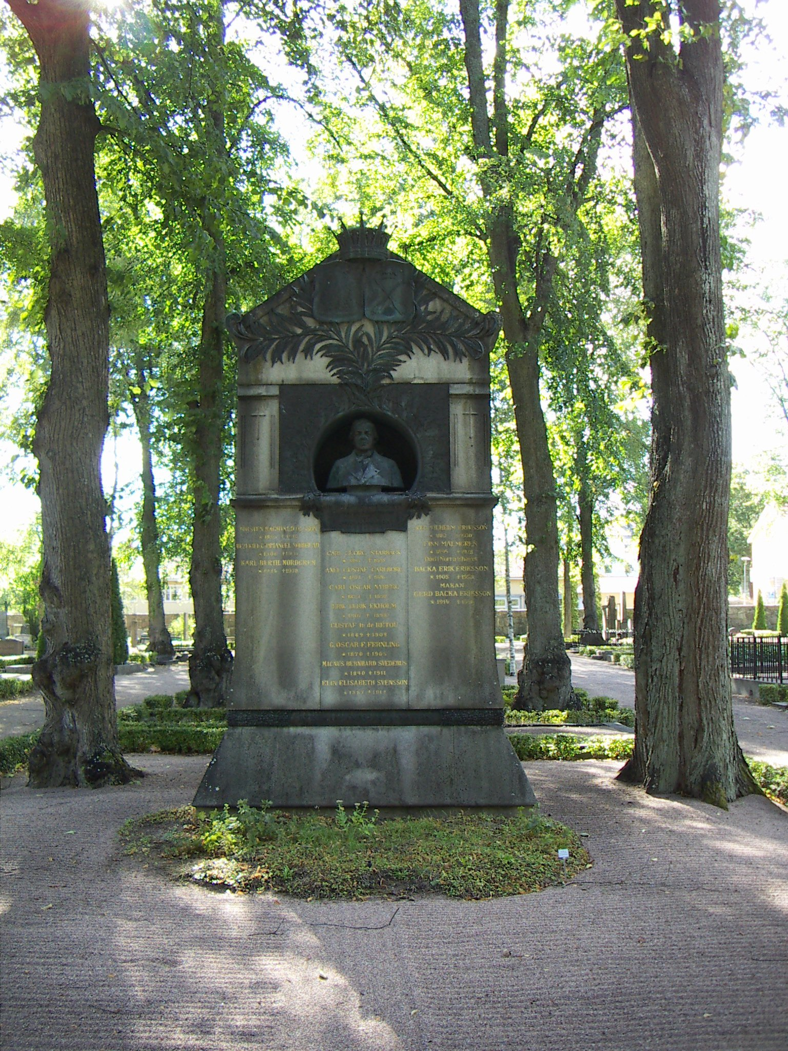 Västmanland-Dala nations nya nationsgravs gravsten på gamla kyrkogården i Uppsala.